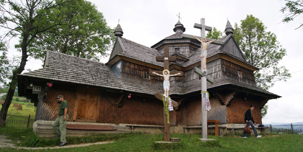 Дерев'яна хрещата одноповерхова Вознесенська Струківська церква (16 ст.,1824 р.)